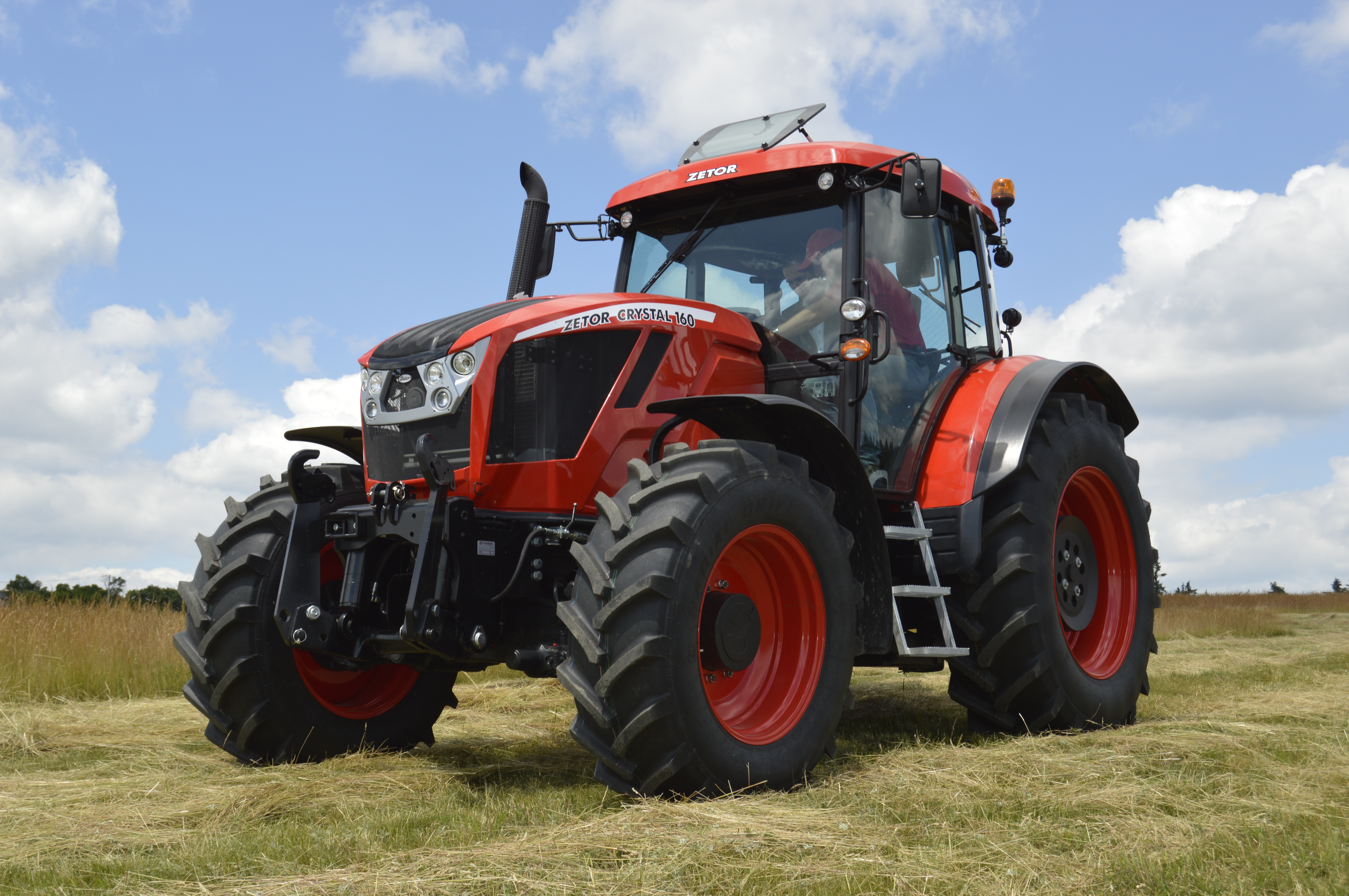 Zetor Crystal on the field